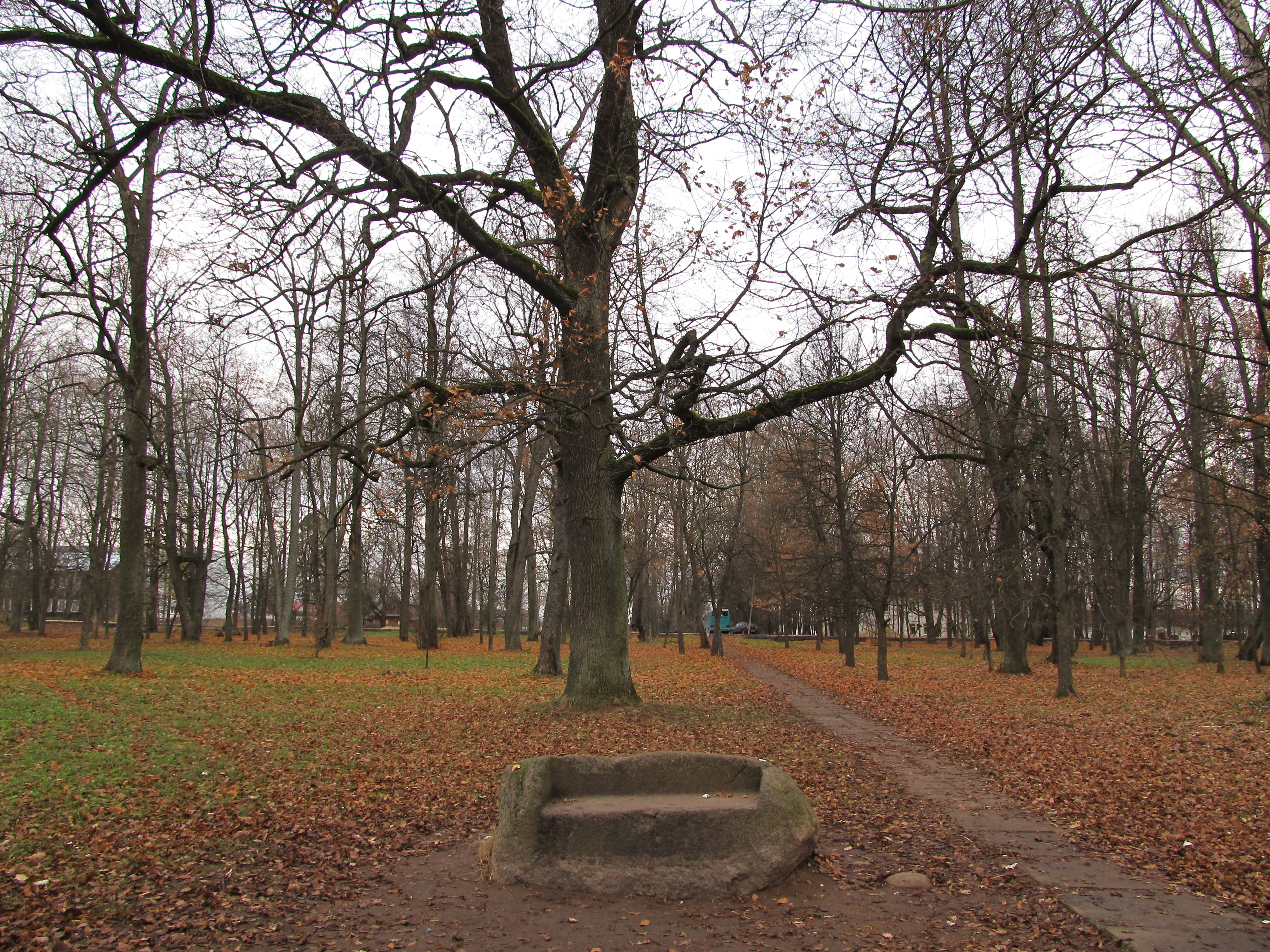 Парк с прудом: Суйда, Гатчинский район, Ленинградская область